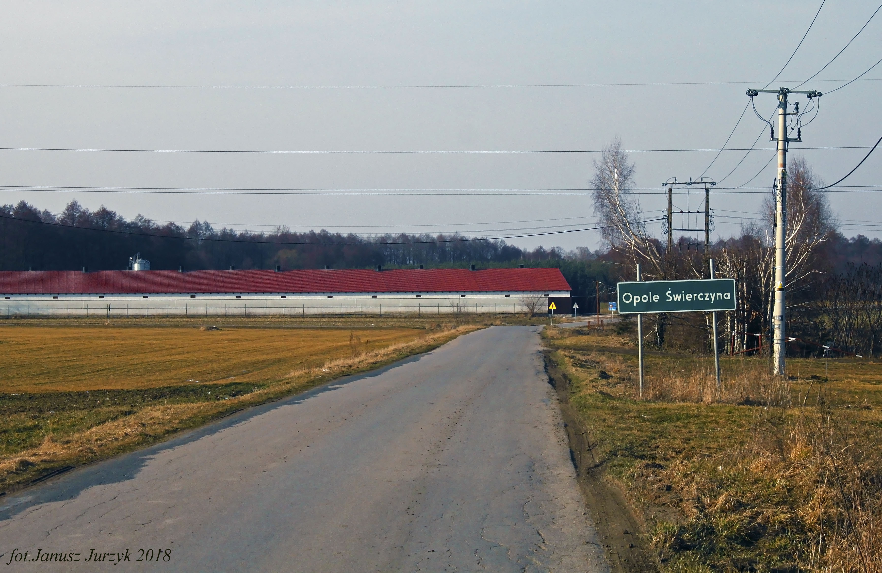 Opole Świerczyna od strony ul. Warszawskiej.